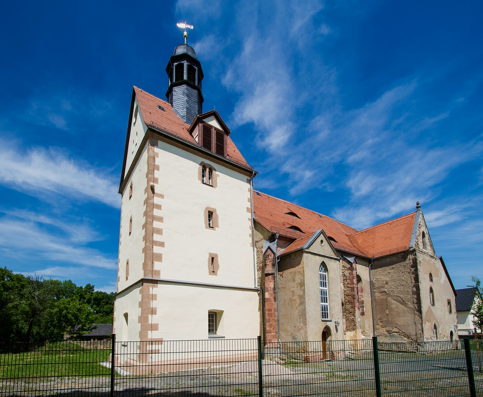 Windischleuba, Nikolaikirche